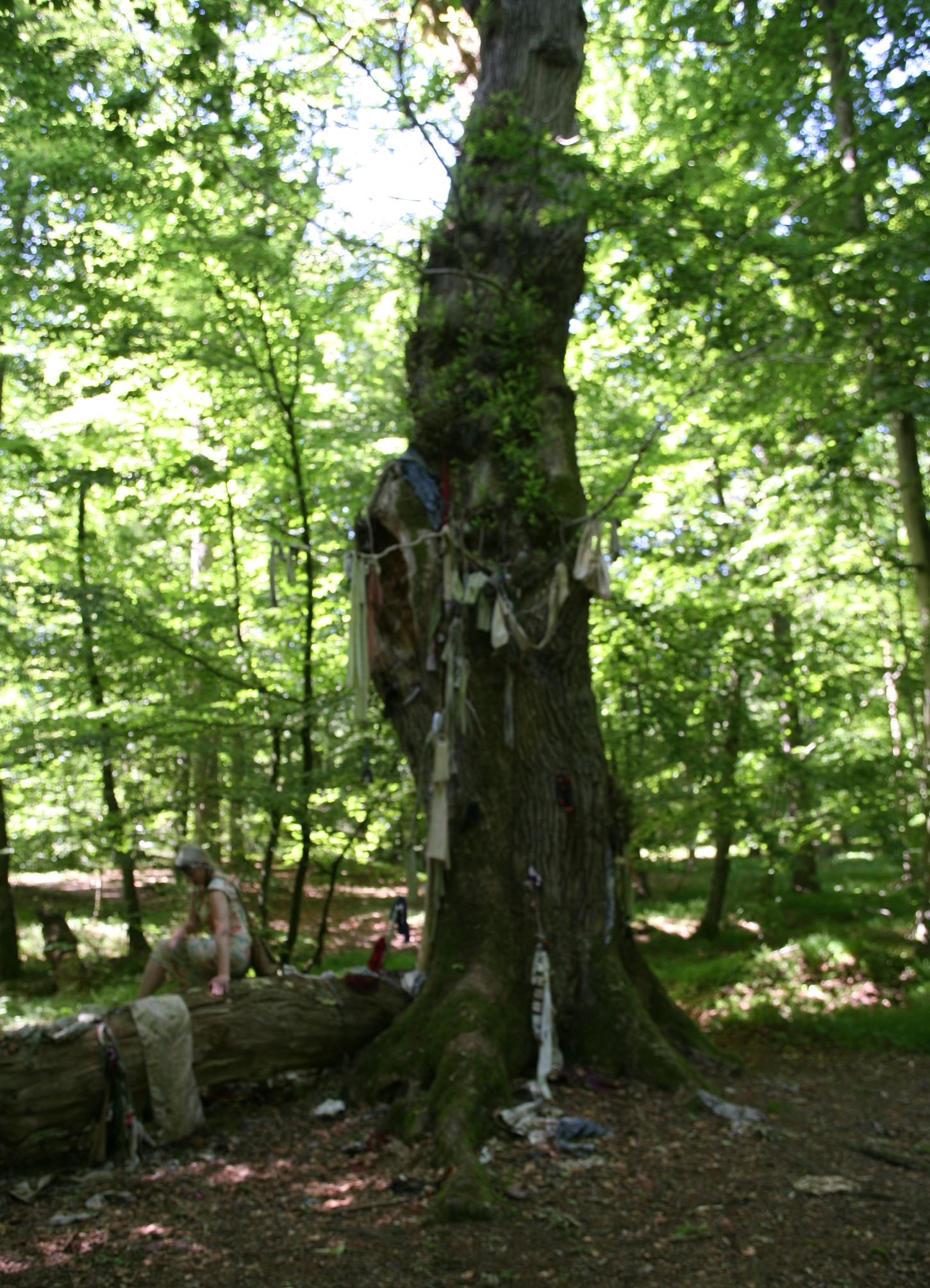 Kludeegen, Leestrup Skov ved Faxe, Danmark